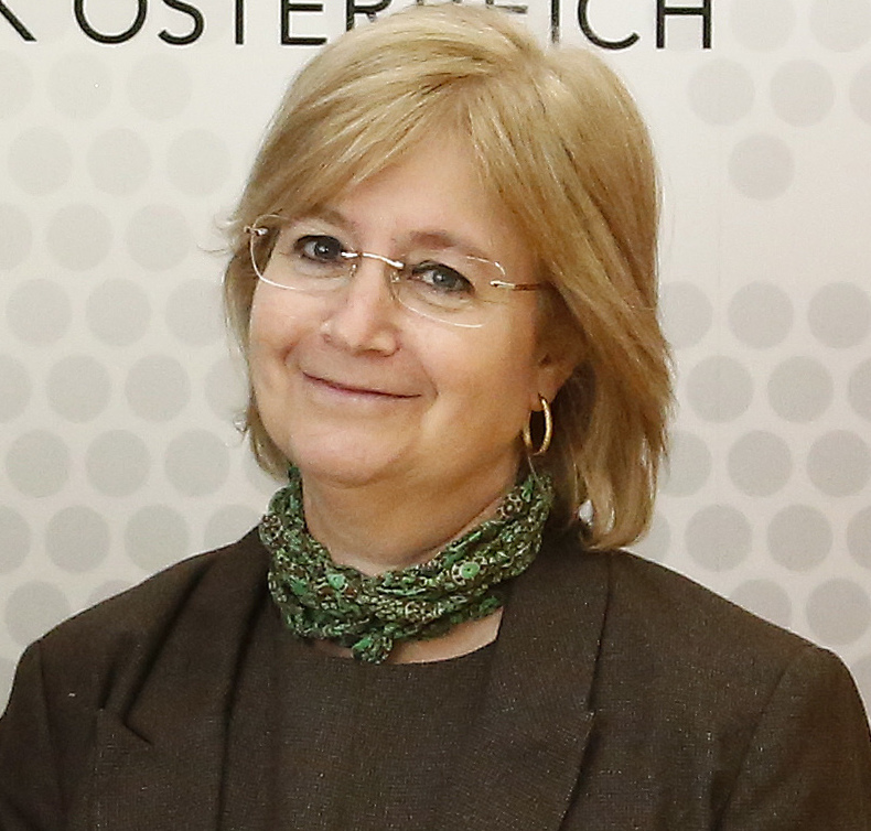 Bundesminister Sebastian Kurz trifft die israelische Botschafterin in Wien. 28.09.2016, Foto: Dragan Tatic